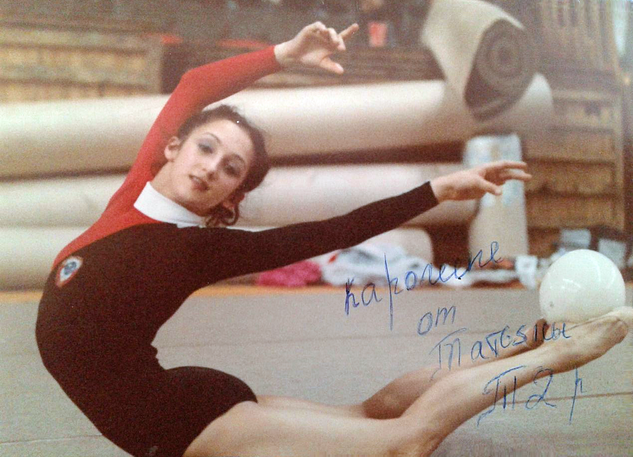 La gimnasta soviética Tatiana Druchinina hacia 1986.